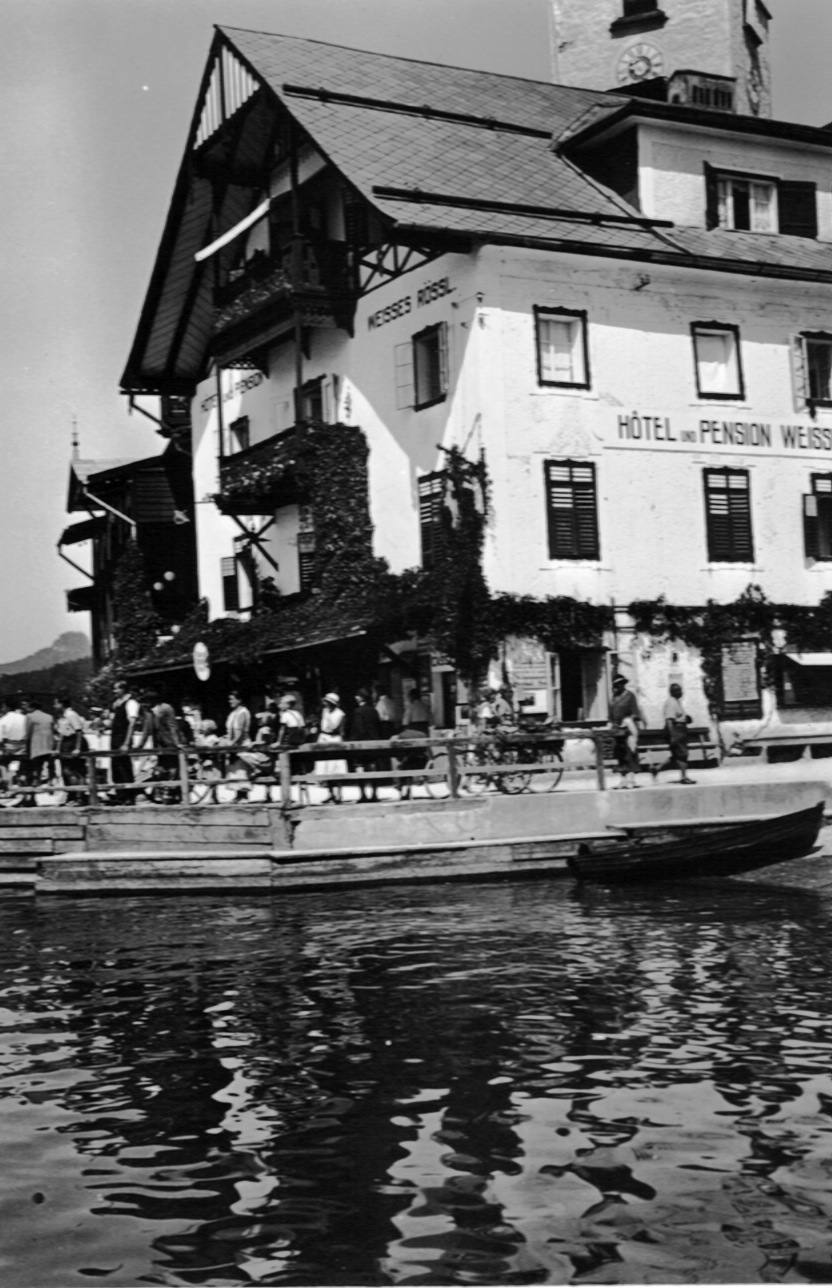 Weisses Rössl (St.Wolfgang)